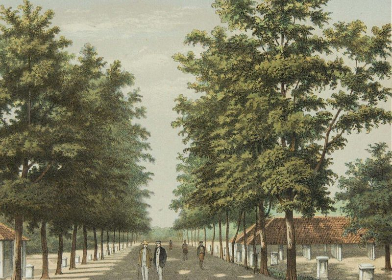 Litho. De chromolitho is vervaardigd naar een tekening van J.C.Rappard.. Pajakoembah